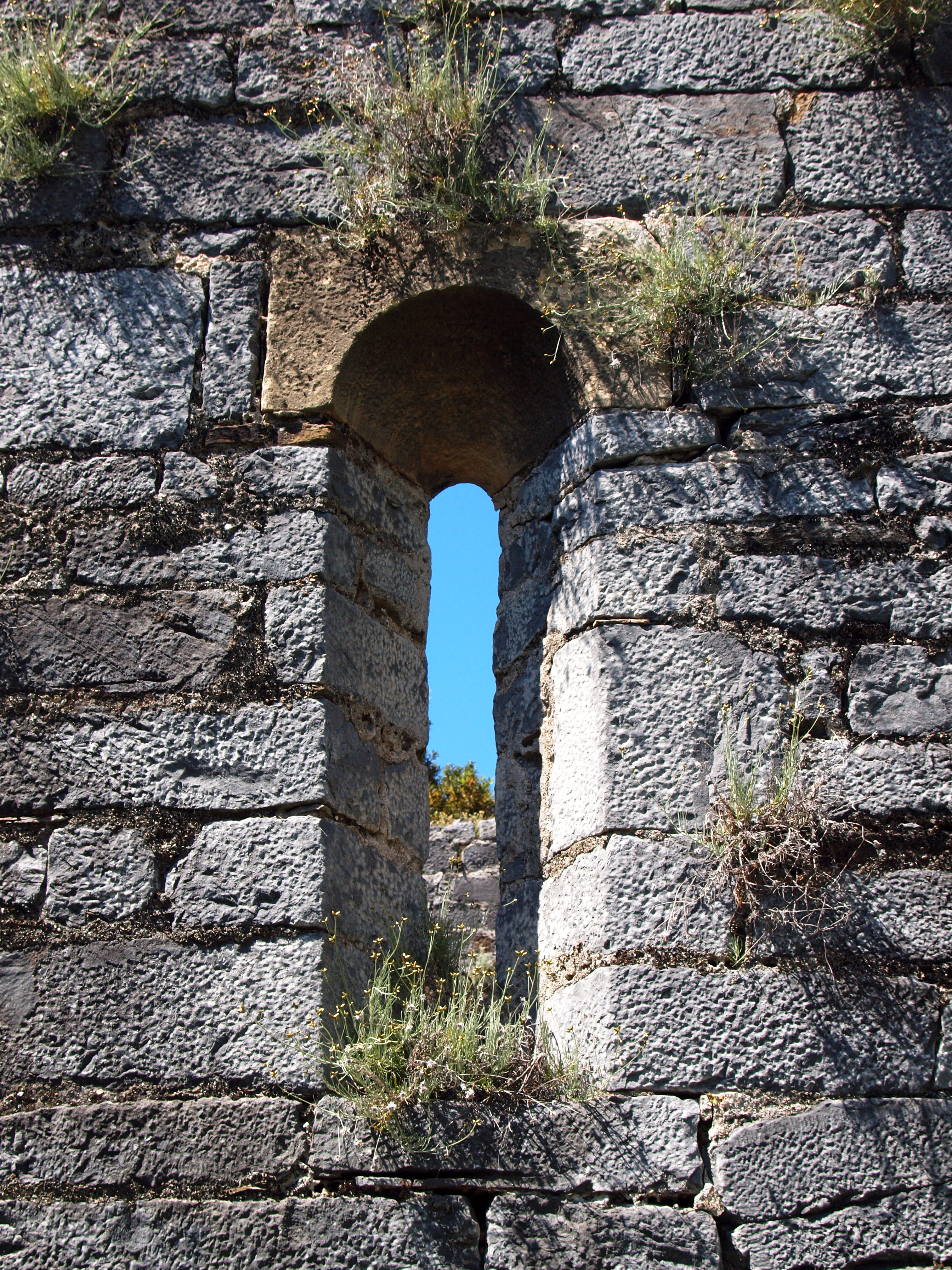 Poggio-d'Oletta, Nebbio (Corse) - L'une des 2 fenêtres-meutrières de la façade sud de l'ancienne chapelle San Quilico (XIe siècle)